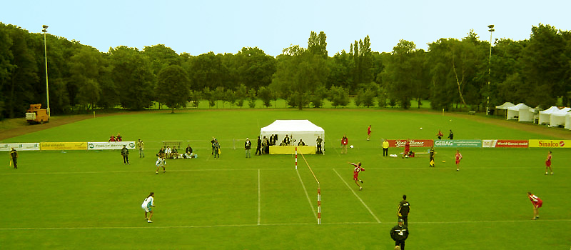 Faustballspiel Schweiz-Argentinien, World Games 2005 Duisburg, Vorrunde